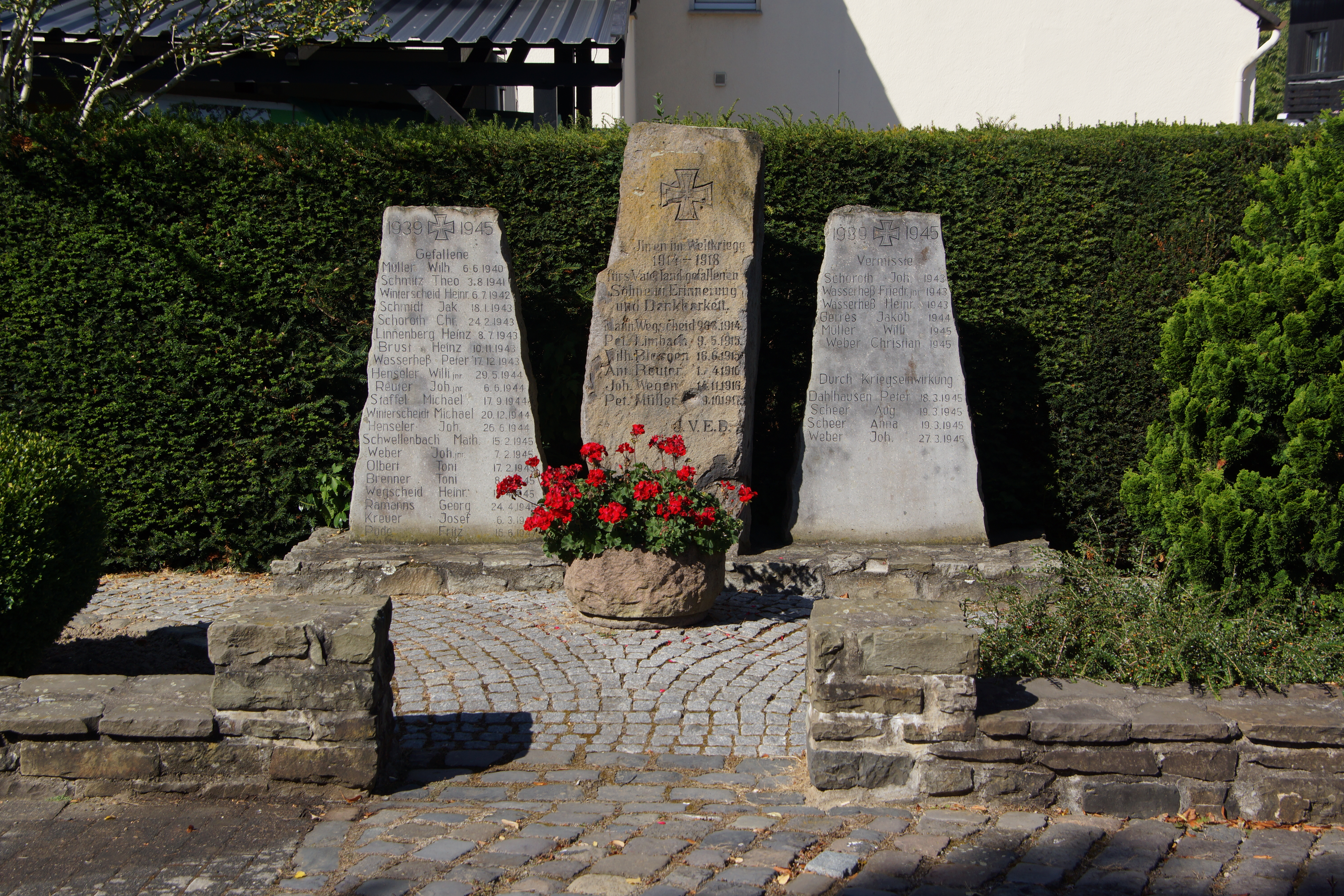 Kriegsdenkmal in Berghausen, Königswinter